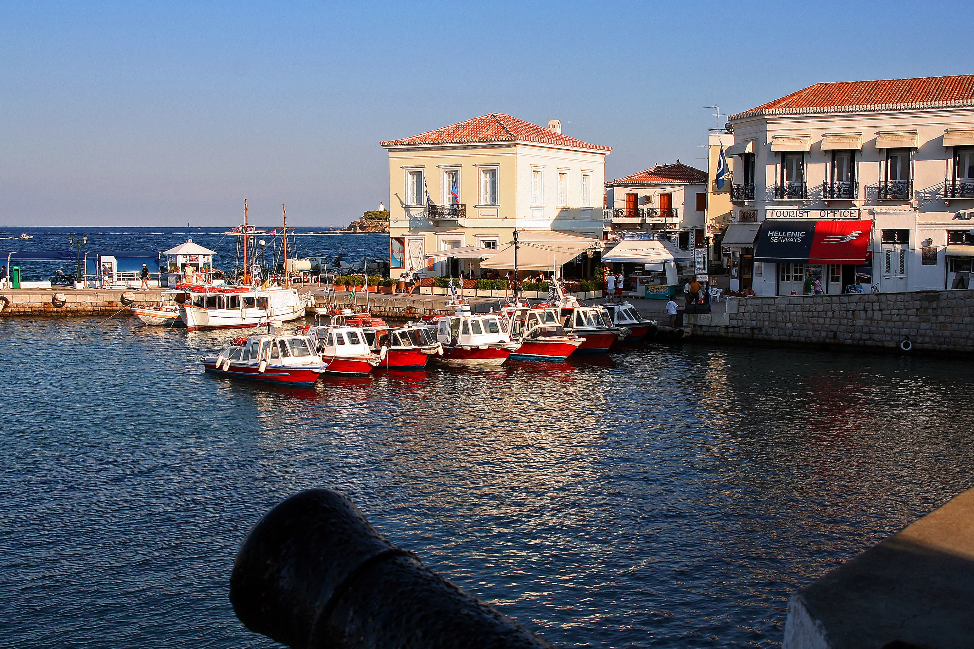 spetses1